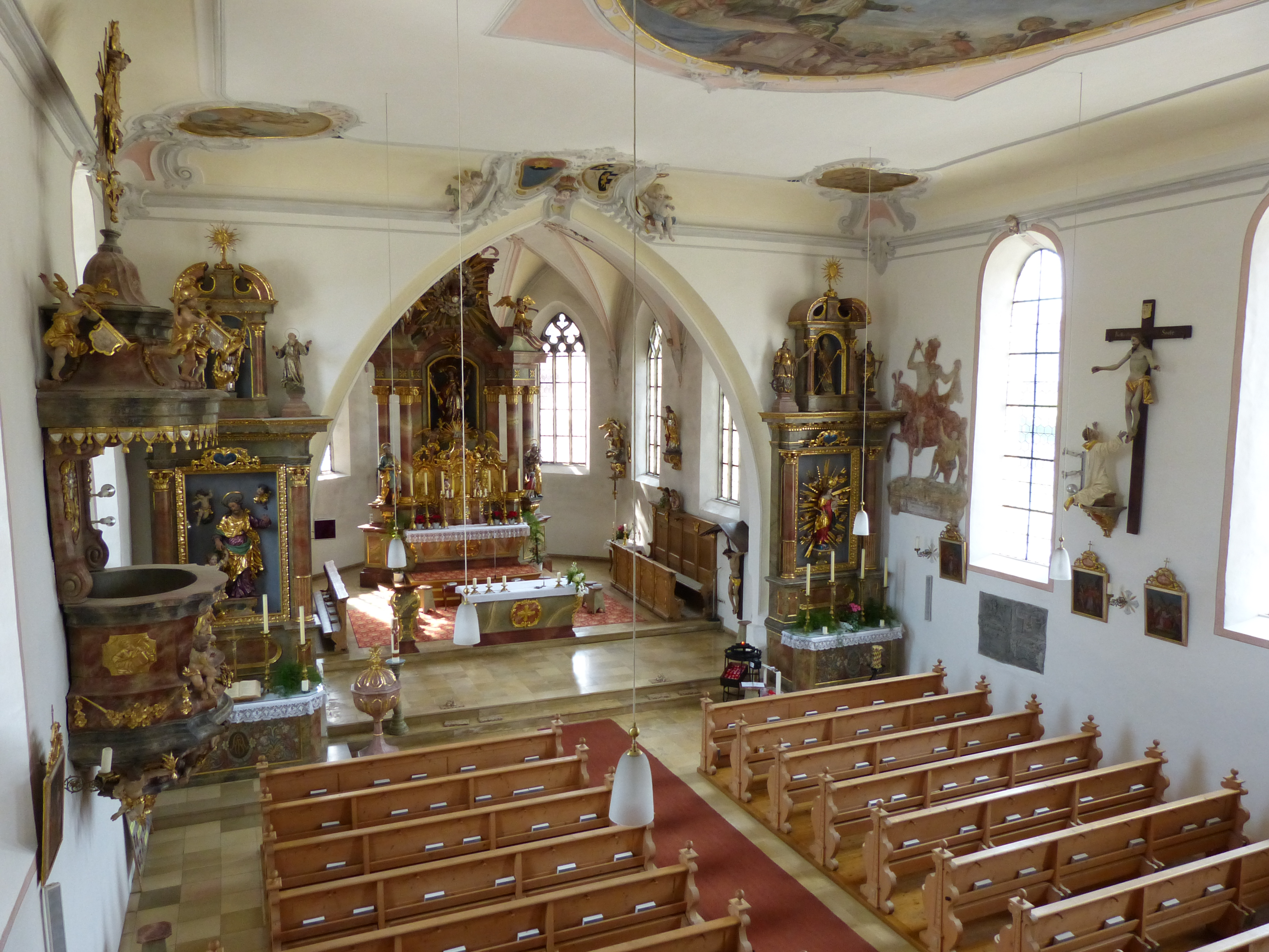 St. Afra Betzigau, Landkreis Oberallgäu, Bayern